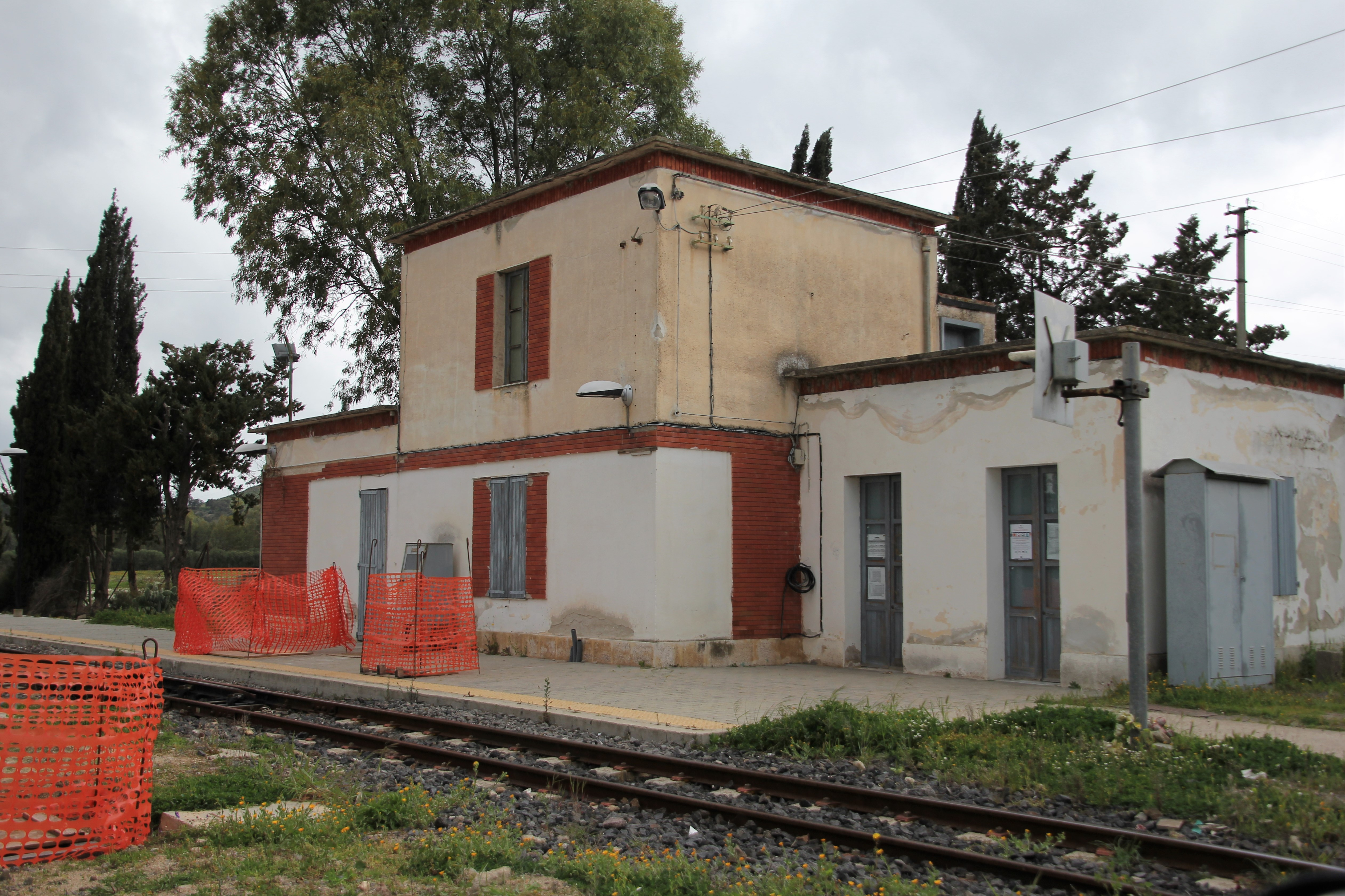 Illorai, stazione ferroviaria di Iscra